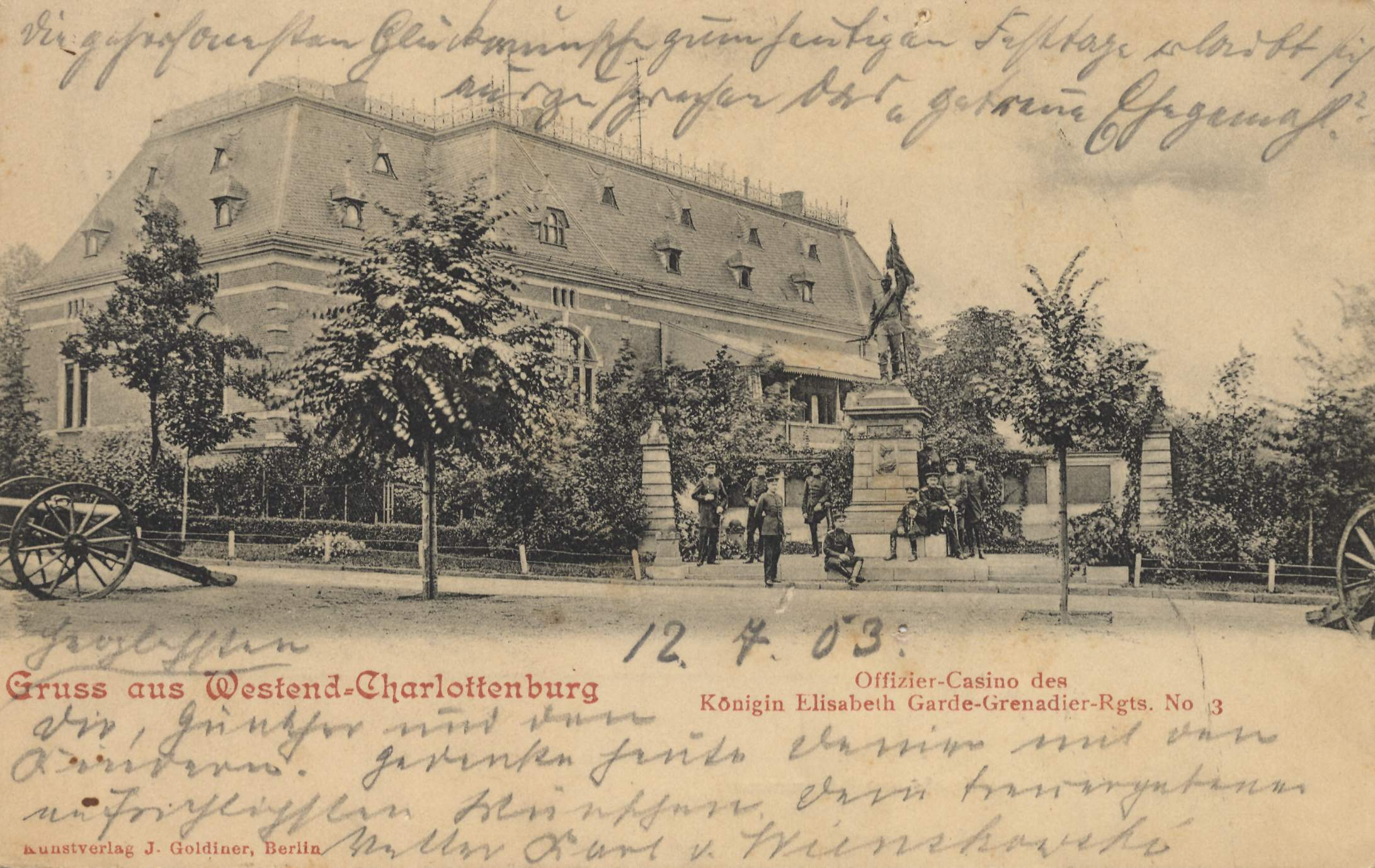 Offizier-Kkasino der Königin-Elisabeth-Kaserne in Berlin-Westend